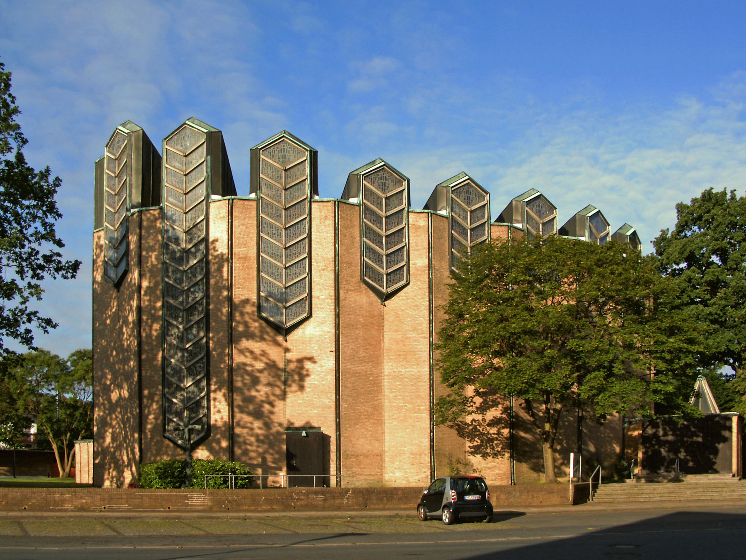 Katholische Kirche St. Heinrich in Wolfsburg, Stadtteil Rabenberg